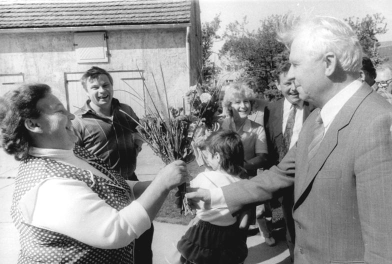 LPG Neuzelle, Besuch einer KPdSU-Delegation ADN-ZB Franke 13.9.89- Bez. Frankfurt: KPdSU-Delegation- Die in der DDR weilende Delegation des ZK der KPdSU unter Leitung von Jegor Ligatschow (r), Mitglied des Politbüros und Sekretär des ZK, besuchte Genossenschaftsbauern in der Kooperation Neuzelle im Kreis Eisenhüttenstadt. Bei einem Rundgang durch das Dorf Möbiskruge kam es auch zu einer herzlichen Begegnung mit der Bäuerin Meta Krüger (l.).